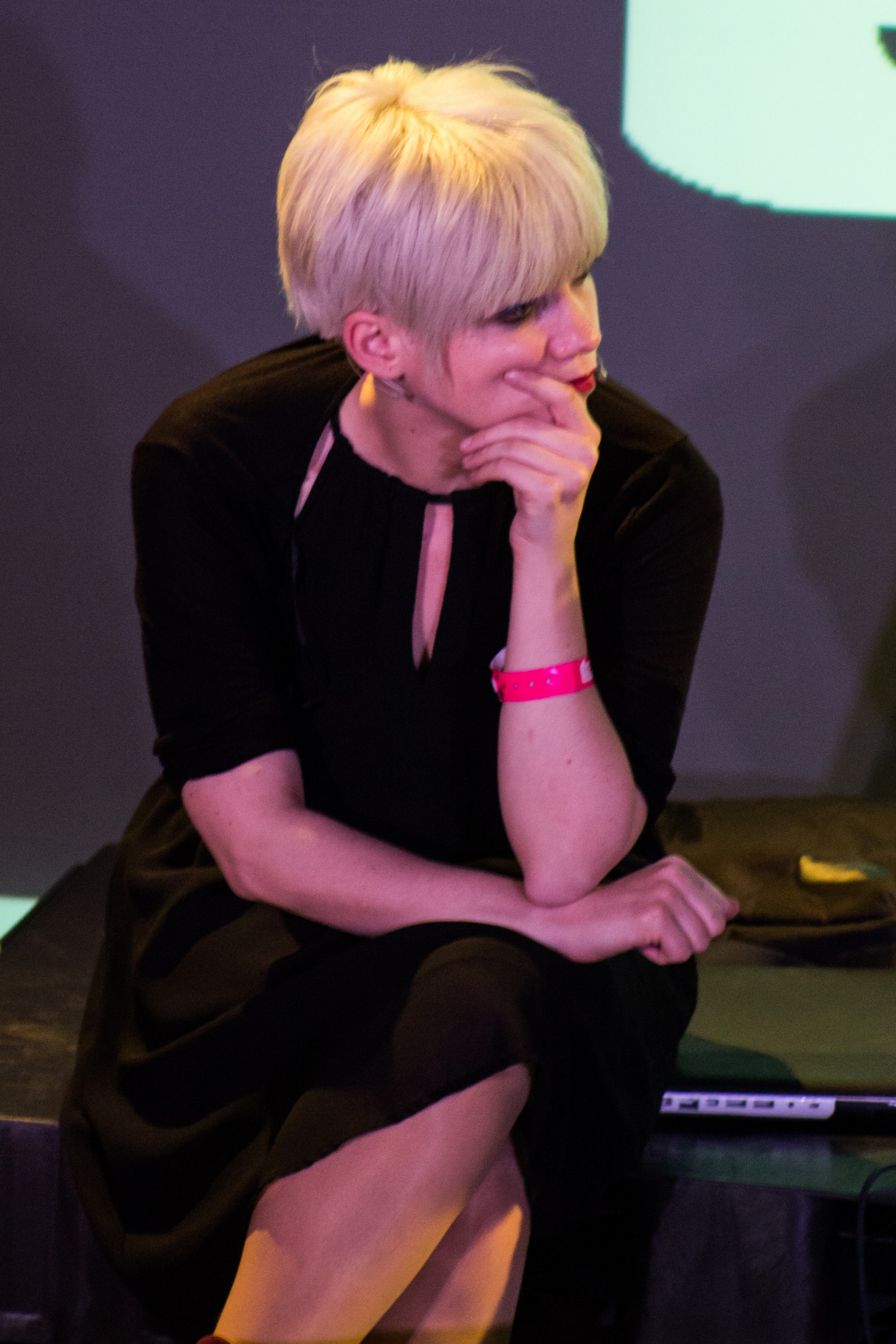 Remedios Zafra (Zuheros, Córdoba, 1973), es una escritora e investigadora española.